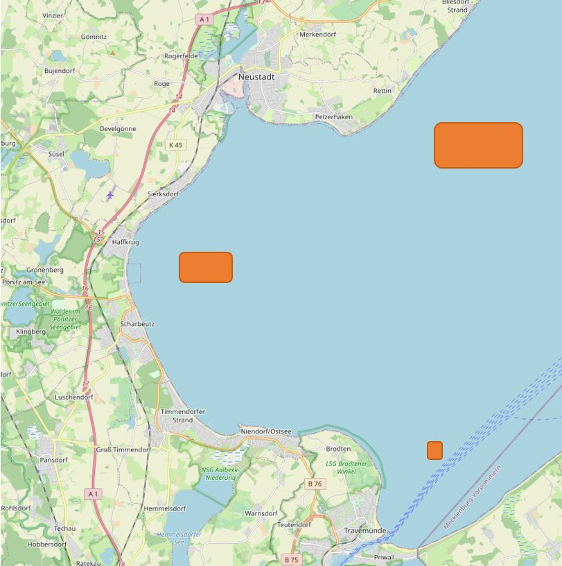 Orte der Munitionsversenkungen in der Neustädter Bucht Karte: OpenStreetMap